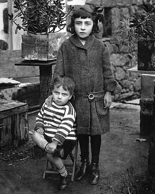 Celso Emilio Ferreiro, con case tres anos de idade, xunto á súa irmá Pilar. Trátase da imaxe máis antiga do poeta. Celanova, 15 de decembro de 1914.